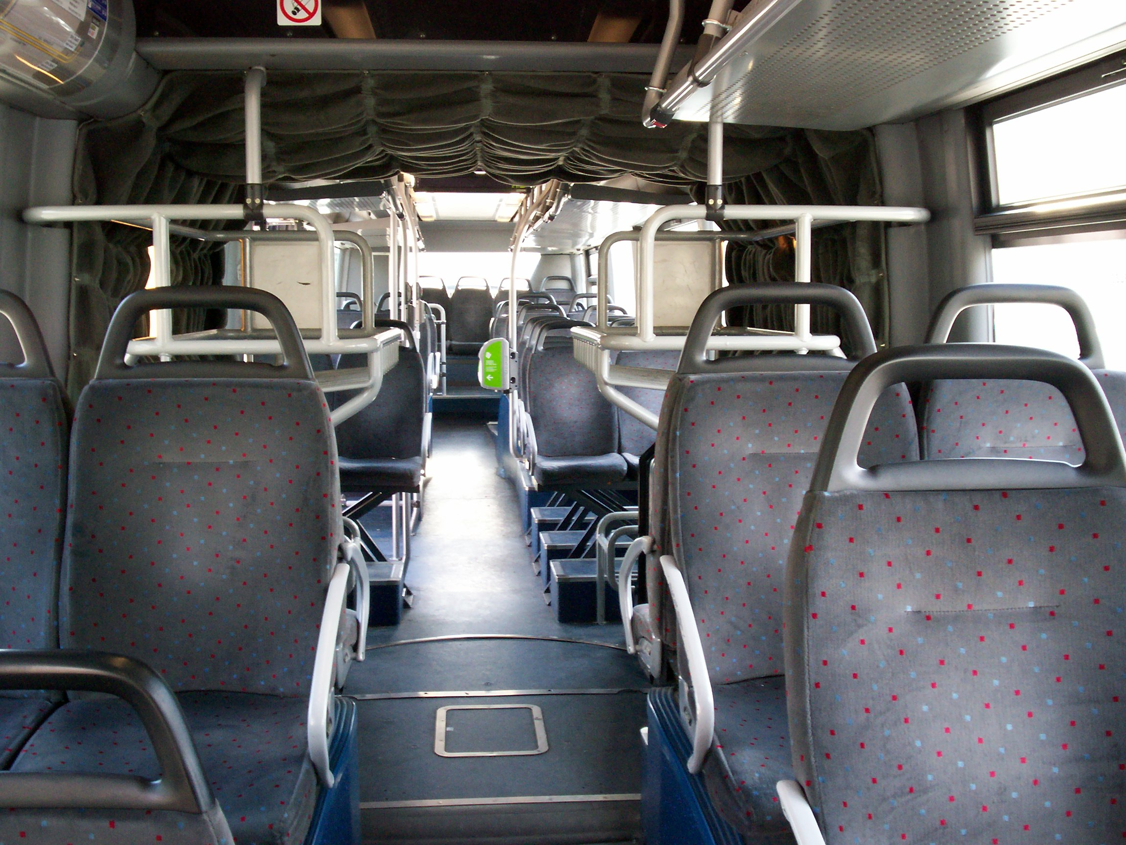 Intérieur du Scania CN94UA OmniCity articulé Orlybus.